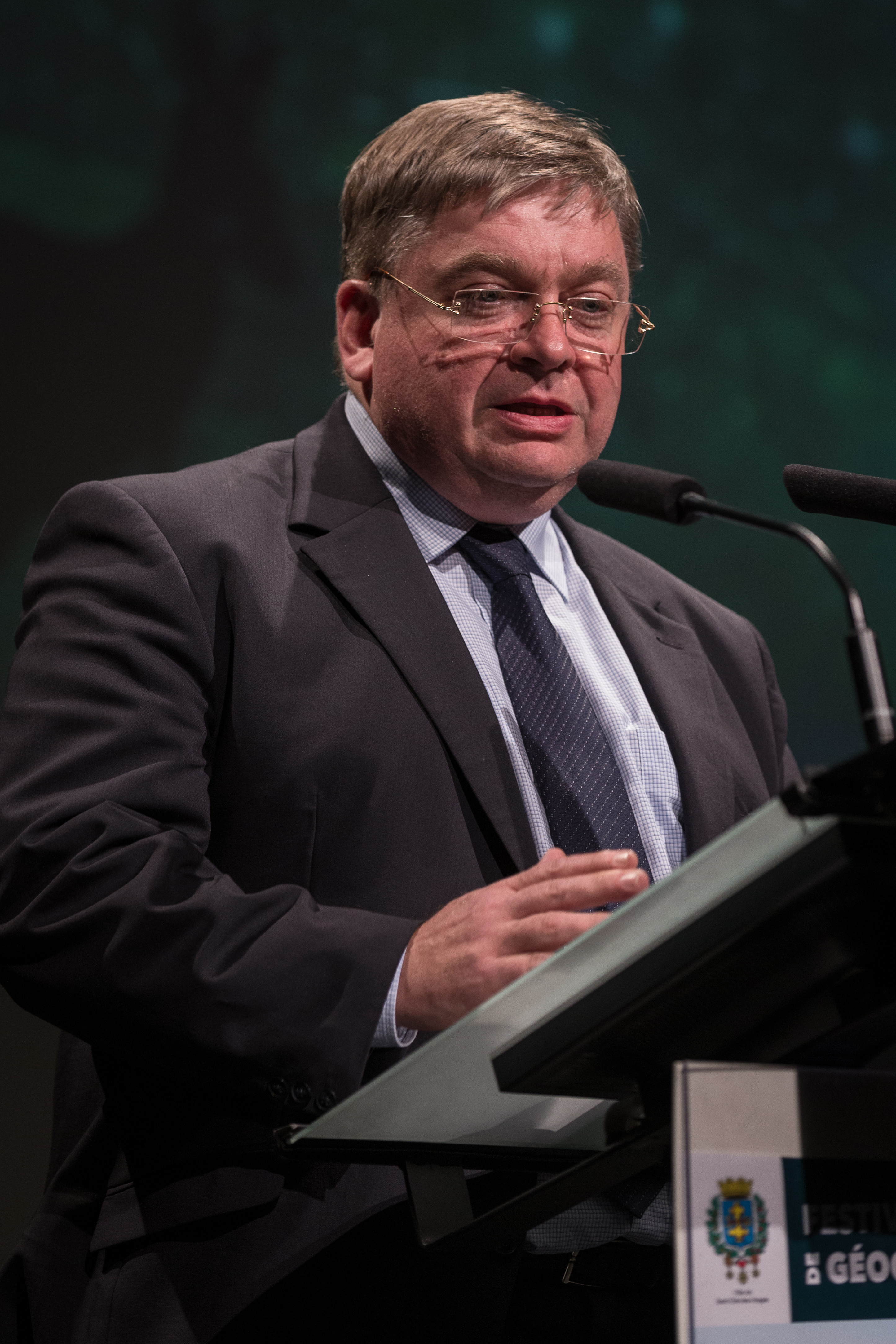 François Vannson, président du conseil départemental des Vosges, lors de la cérémonie d'ouverture du Festival international de géographie 2015.